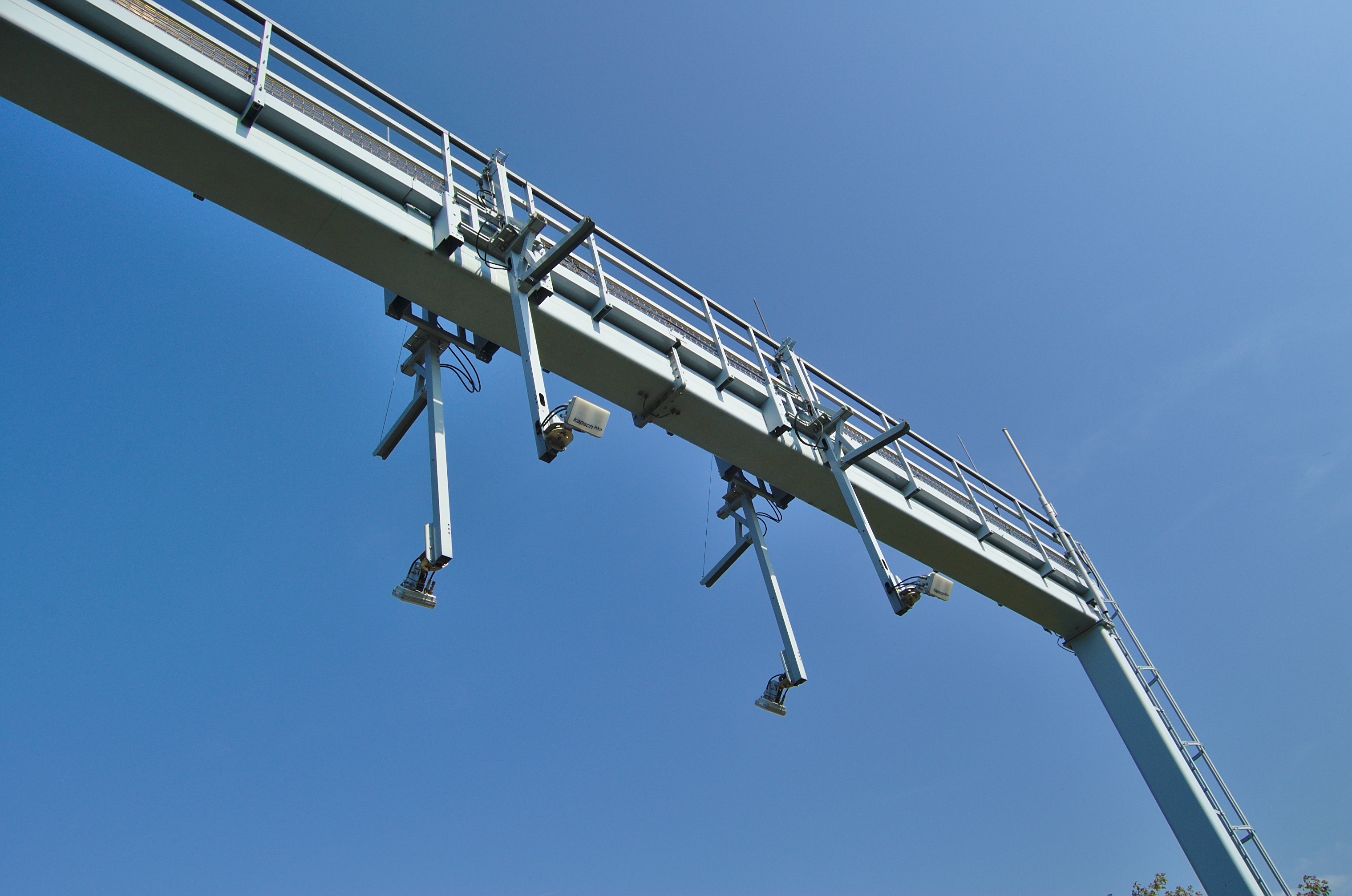 Mýtná brána Kapsch, Lýsky, Přerov